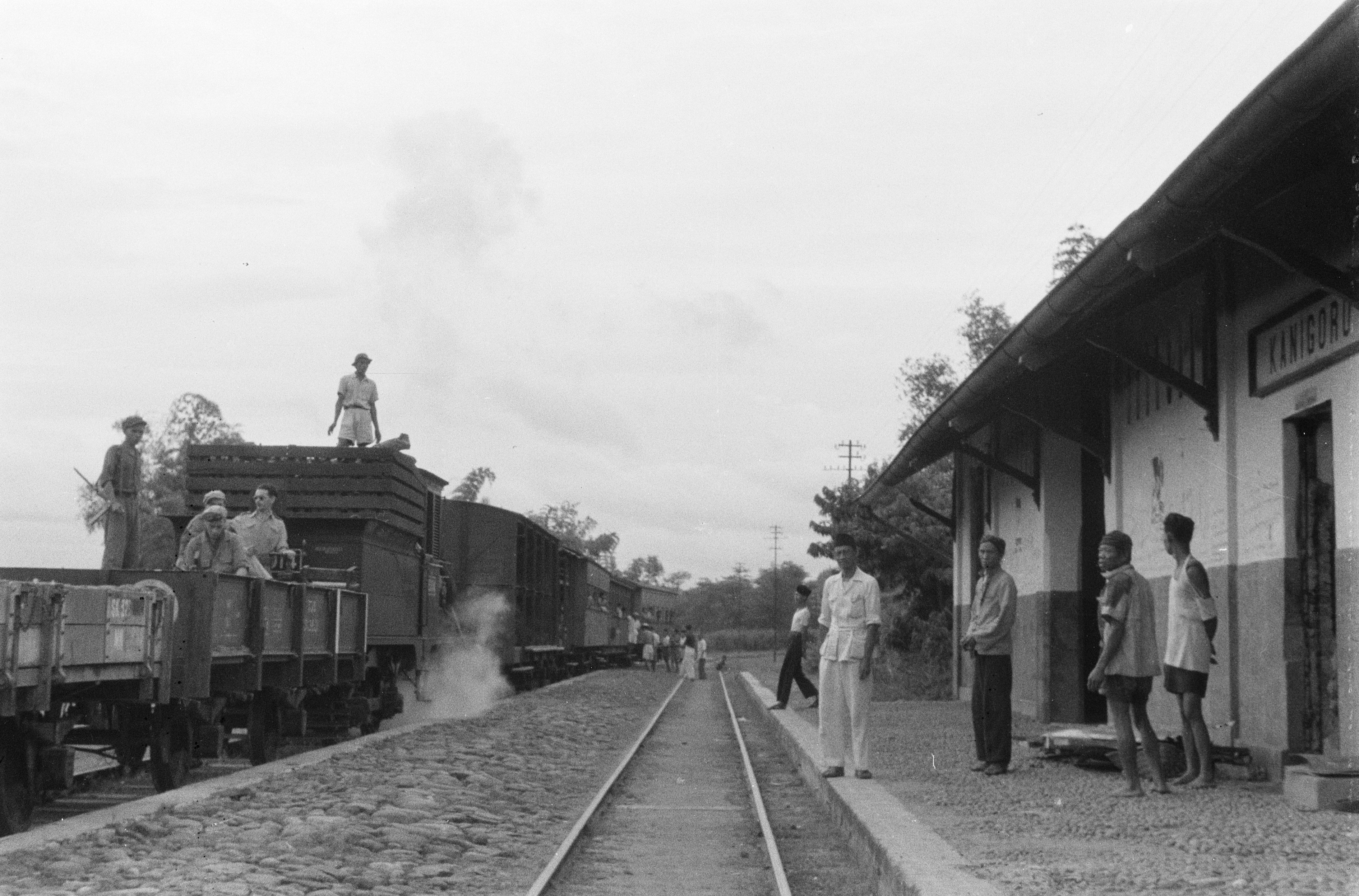 Collectie / Archief : Fotocollectie Dienst voor Legercontacten Indonesië Reportage / Serie : [DLC] Madioen: treinbeveiliging Beschrijving : Bescherming van een trein bij Madioen, door jager Bal uit IJmuiden en Karel Horsman uit Leiden Datum : 10 februari 1949 Locatie : Indonesië, Nederlands-Indië Fotograaf : Kellenbach, F.C. / DLC Auteursrechthebbende : Nationaal Archief Materiaalsoort : Negatief (zwart/wit) Nummer archiefinventaris : bekijk toegang 2.24.04.02 Bestanddeelnummer : 3374